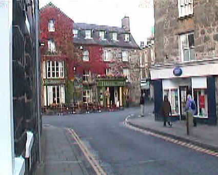 Straße in Dolgellau, Wales